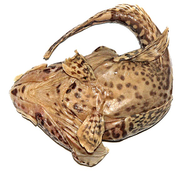 Pogonophryne ventrimaculata, 195 mm TL, ventral view (formalin)